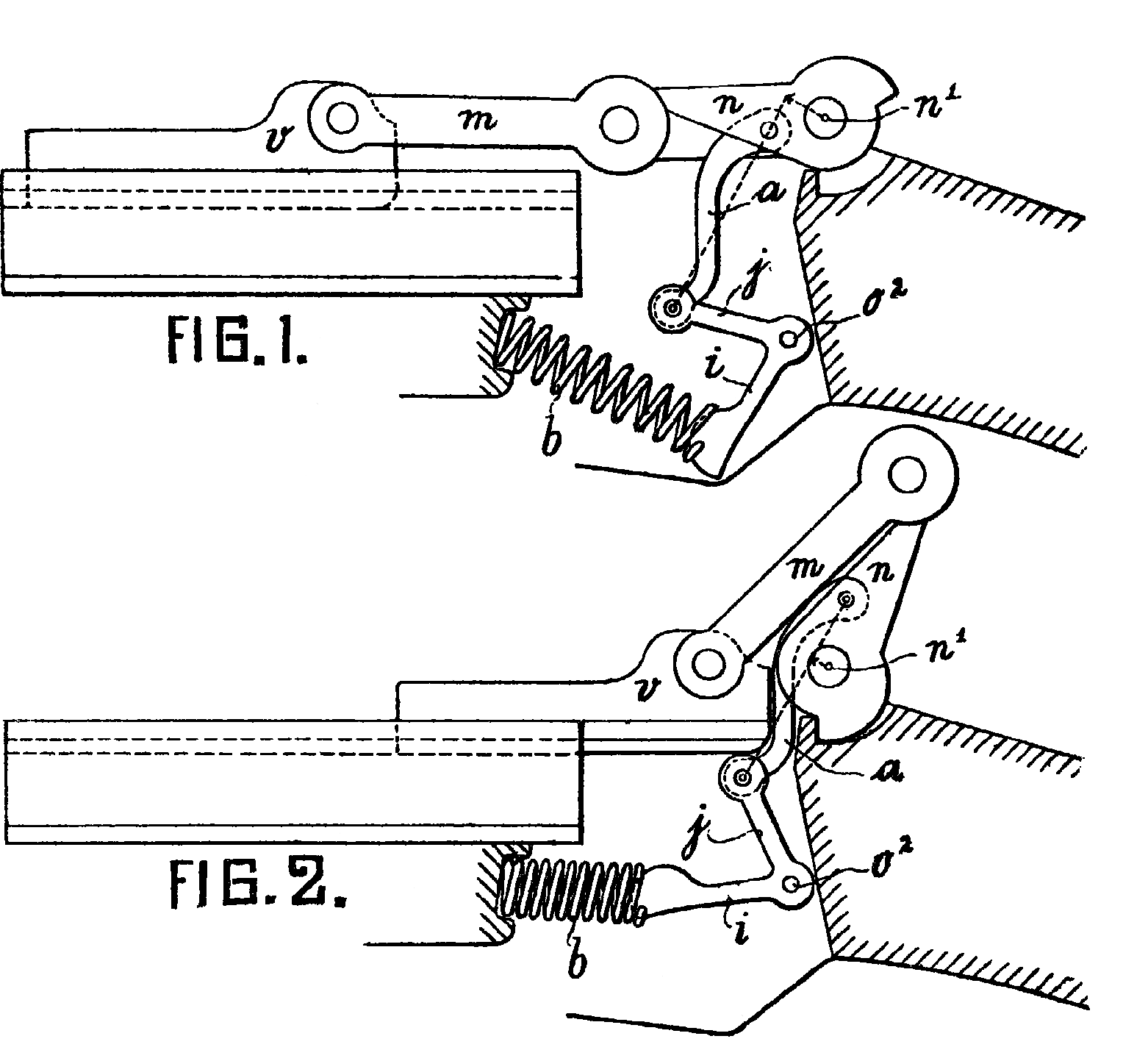 Détail du mécanisme de rechargement par recul de la culasse, issu du brevet UK 4126.